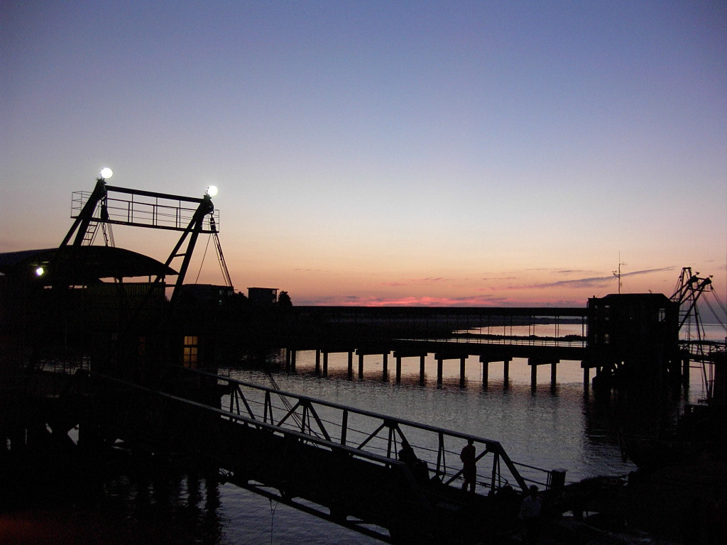 堡镇码头